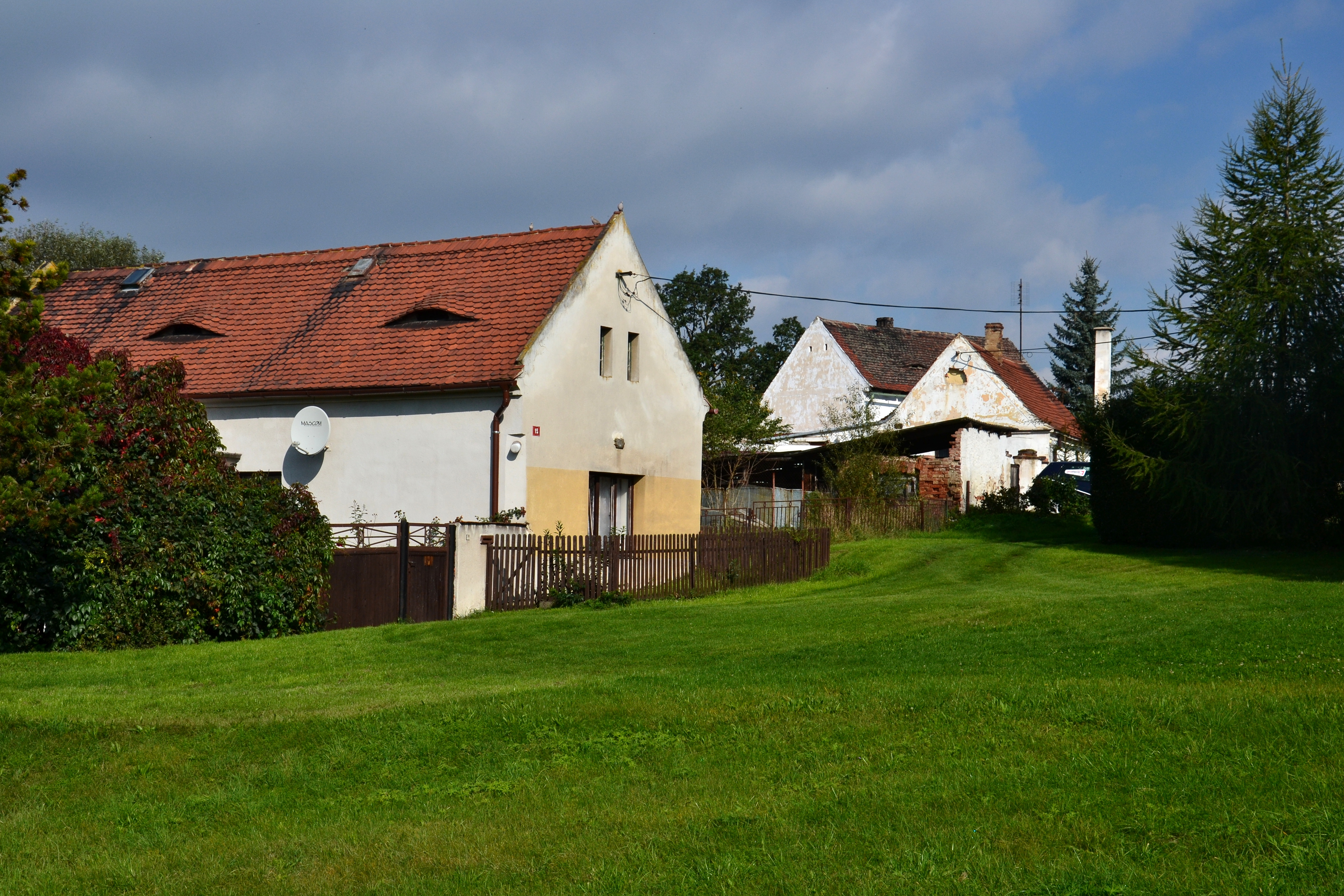 Voděrady - domy nanávsi